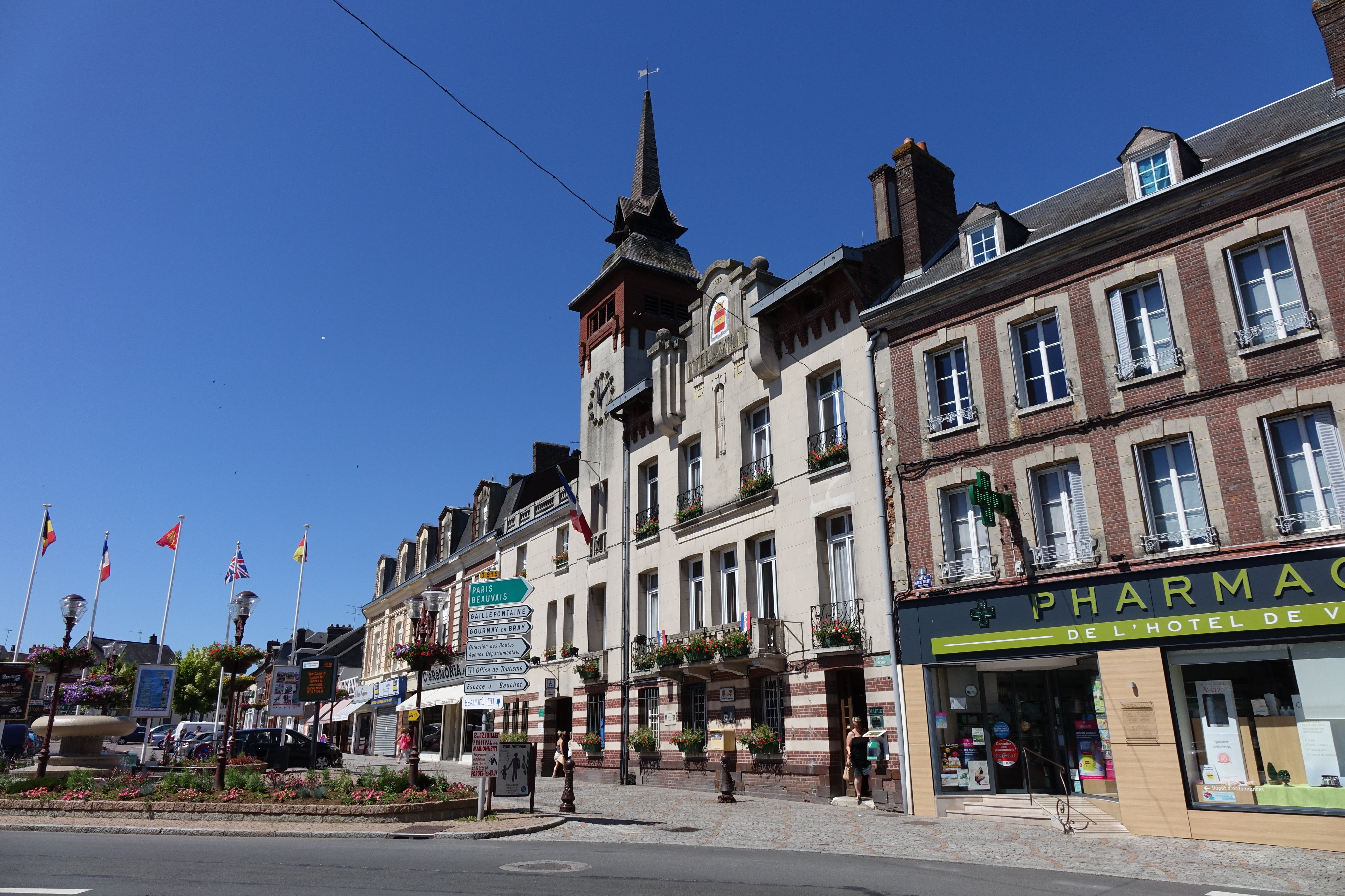 Hôtel de ville de Forges-les-Eaux, côté rue, Seine-Maritime, France